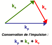 Description : Conservation de l'impulsion dans un OPO. Source : personnelle Catégorie:Schéma de physique